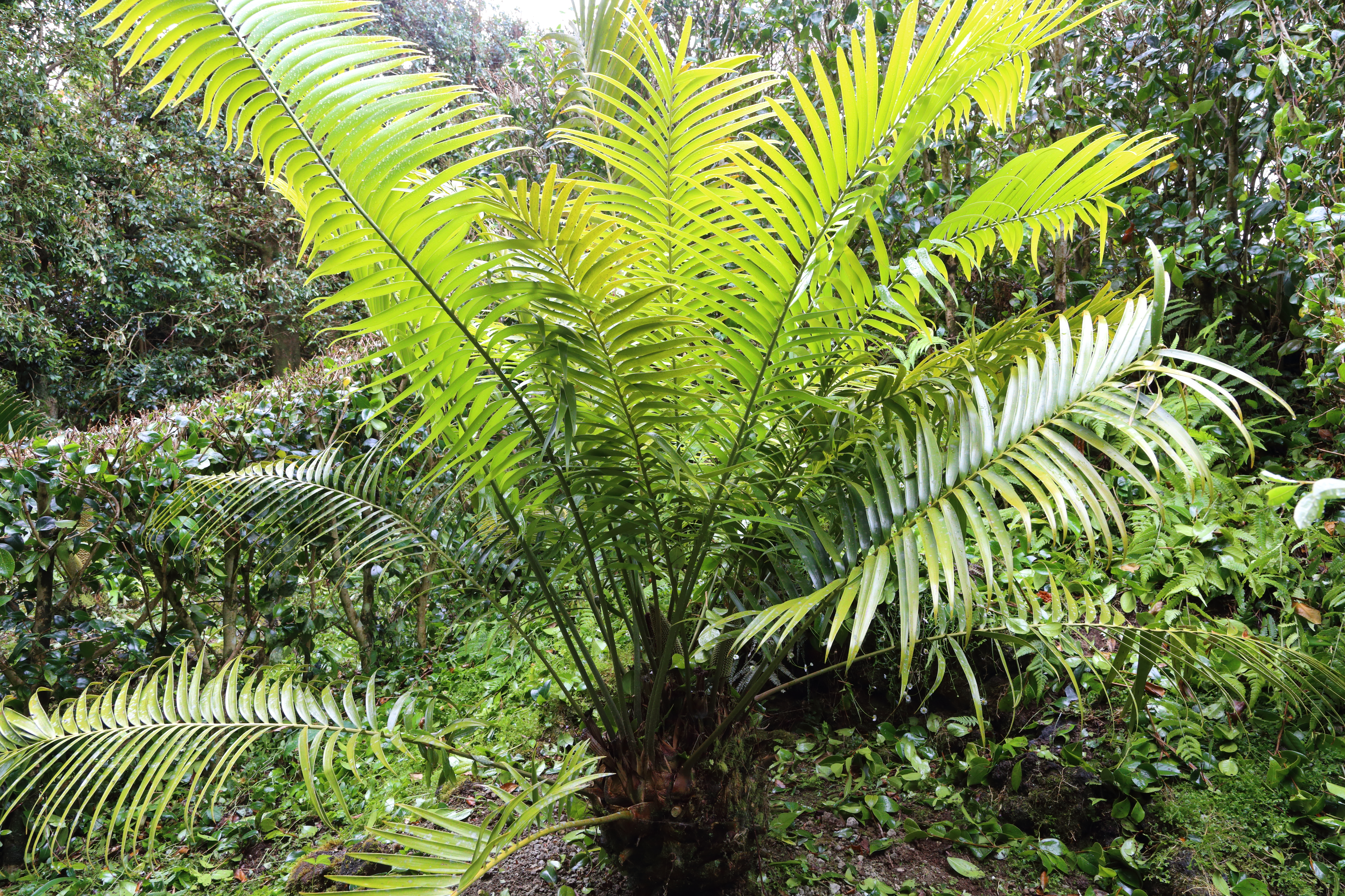 Ceratozamia mexicana i parken Terra Nostra, Furnas, São Miguel, Azorerna.